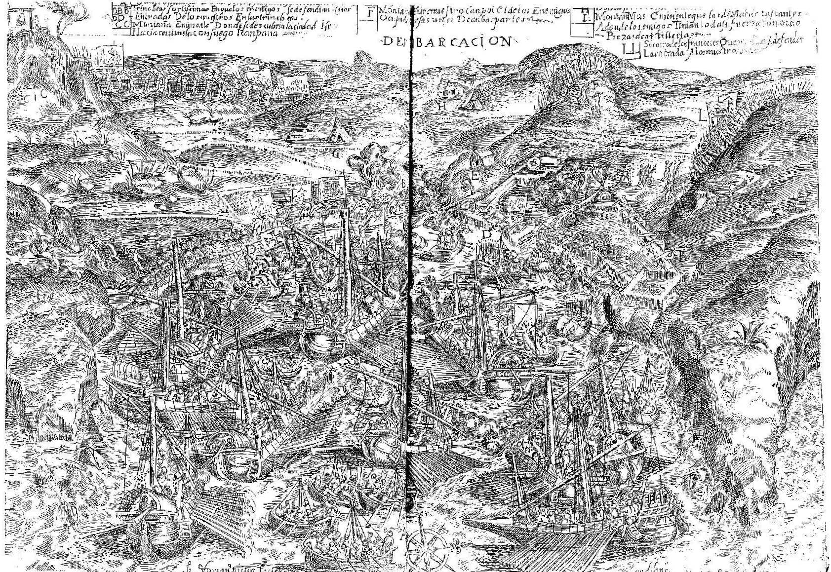 "Pintura de la desembarcación y asalto", hoja de lámina plegada incorporada a la obra de Cristóbal Mosquera de Figueroa "Comentario en breue compendio de disciplina militar: en que se escriue la jornada de las islas de los Açores", en Madrid por Luis Sánchez, 1596. Estampa calcográfica firmada en Cádiz según Juan Agustín Ceán Bermúdez por Pedro Román (Diccionario de los más ilustres profesores..., vol. VI, pp. 85-86